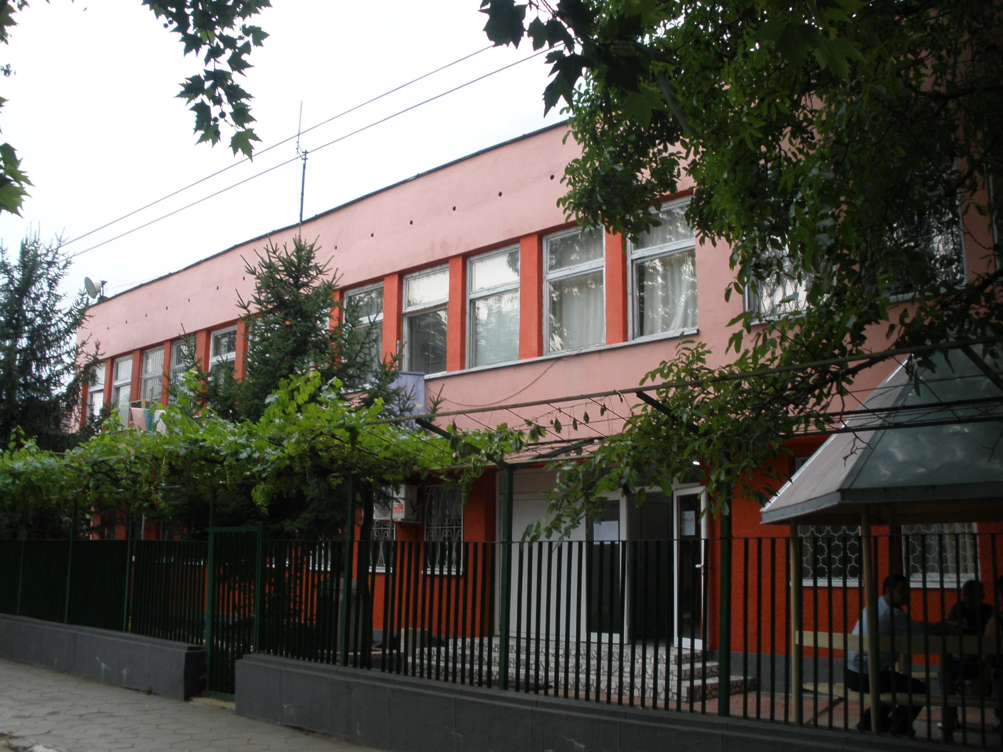 Районно полицейско управление в Стамболийски.